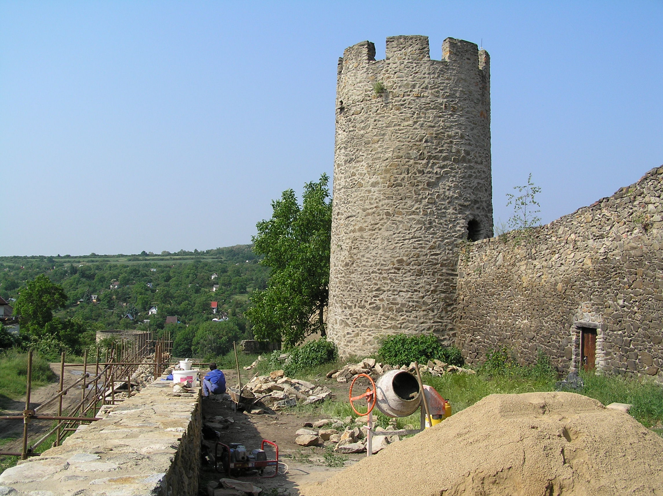 Městské opevnění (Znojmo), Znojmo